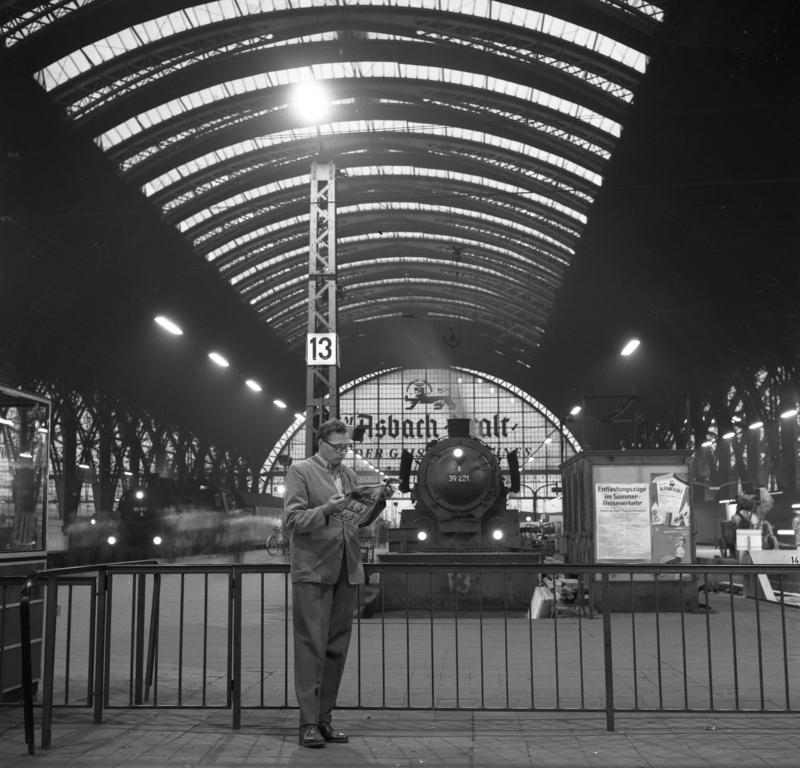 Stadtaufnahmen Frankfurt/Main Hauptbahnhof und Umgebung